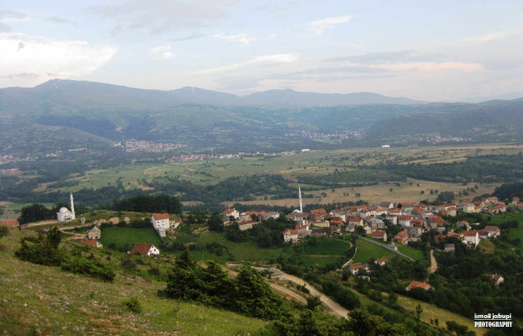 Fshati Brrut